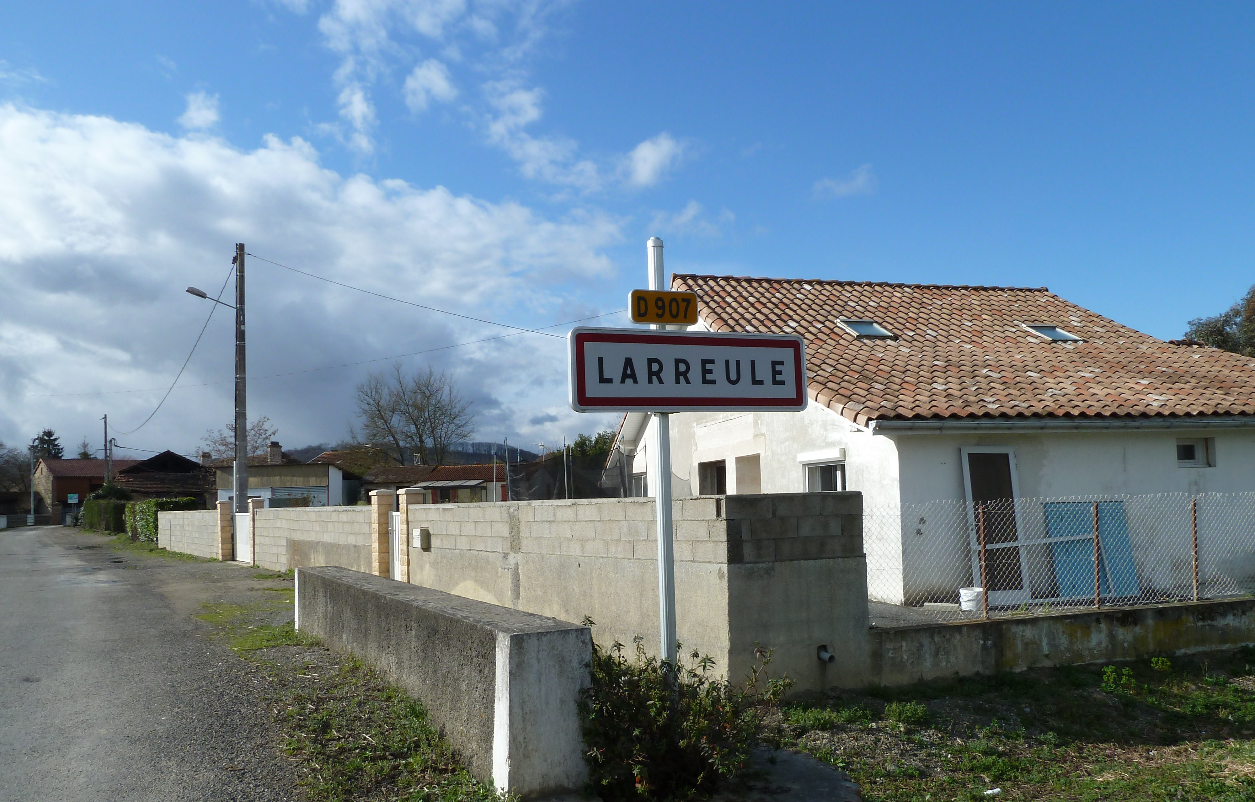 Entrée dans Larreule (Hautes-Pyrénées)